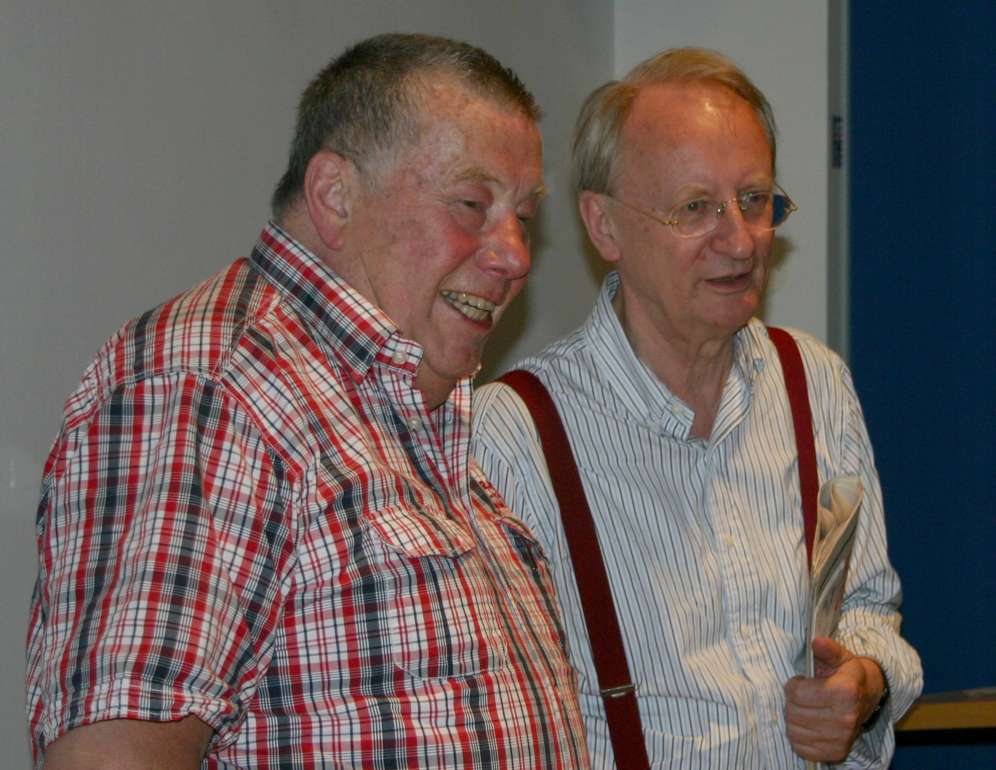 Der Galerist und Publizist Jürgen Schweinebraden (Jürgen Walther Herrmann Schweinebraden Freiherr von Wichmann-Eichhorn) und der Akademiepräsident und Grafikdesigner Klaus Staeck.